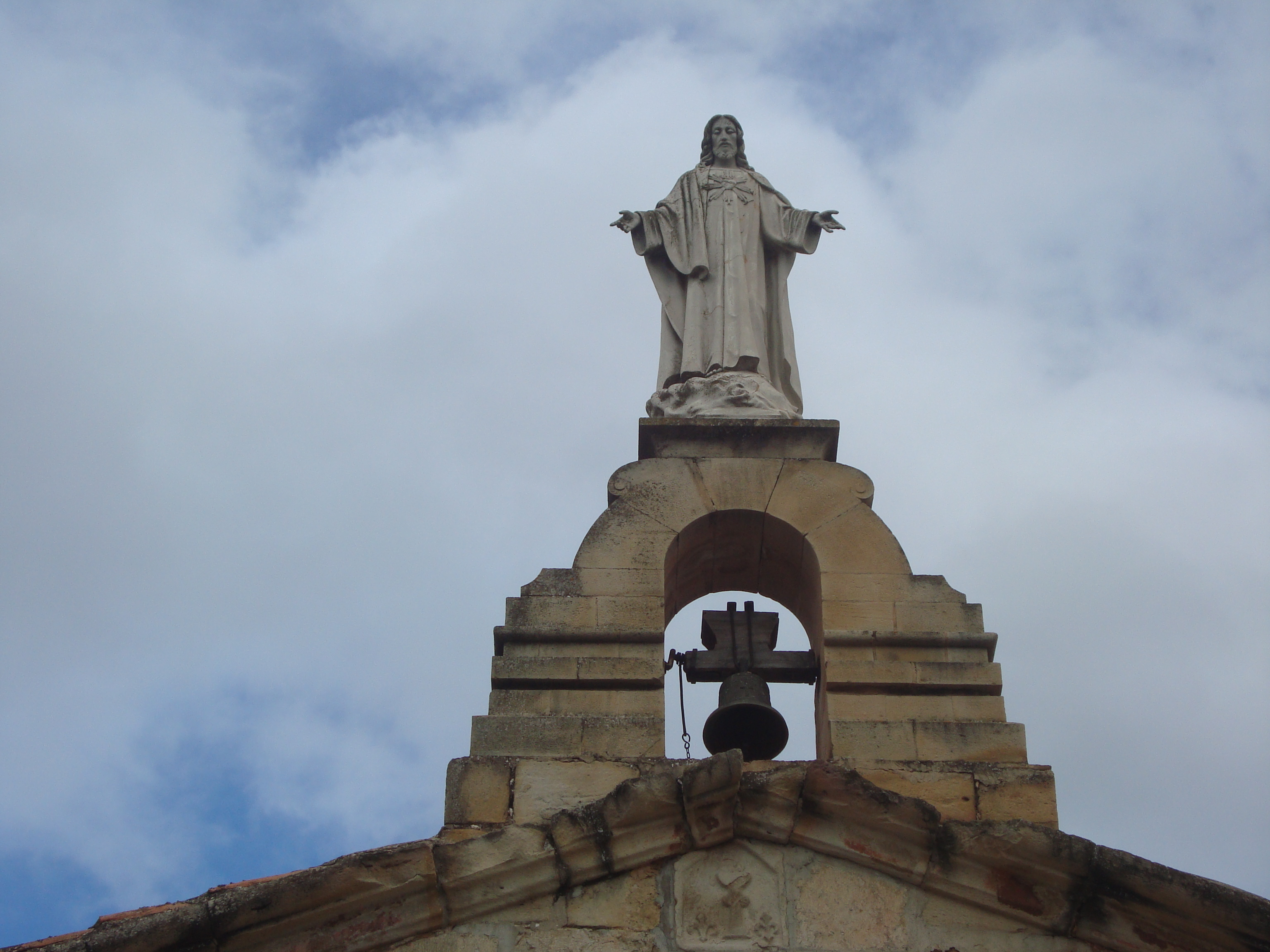 Imagen del Cristo de la Agonía, Les Useres/Useras